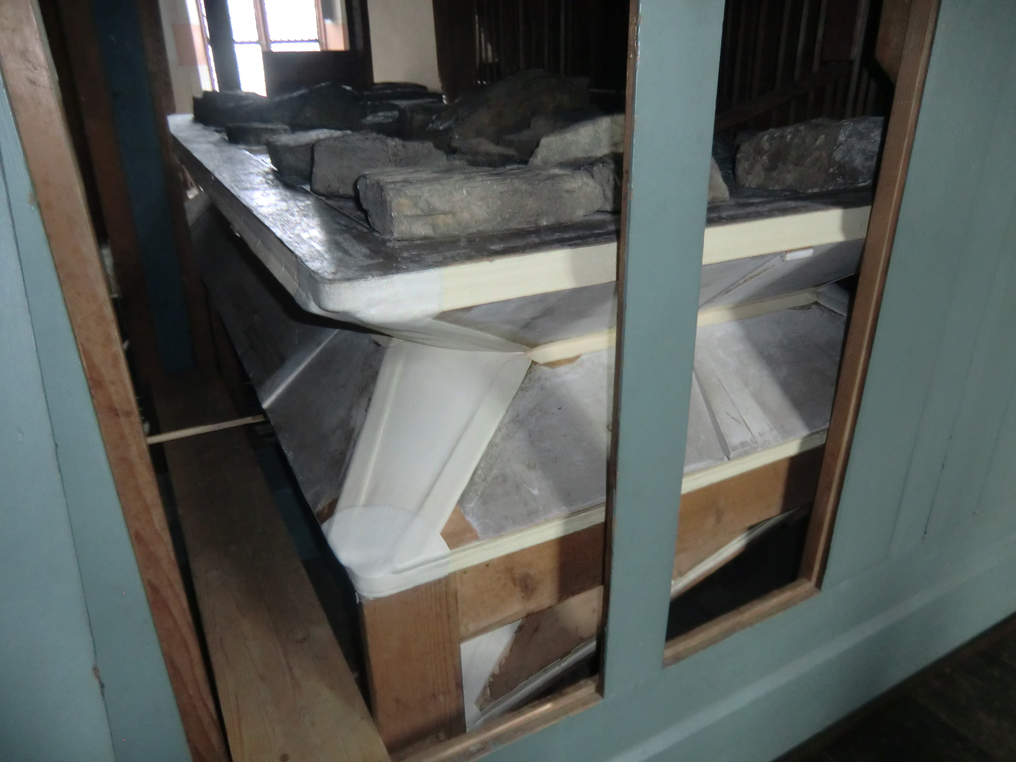 Keller-Orgel Kransberg (1876) - Windanlage (Magazinbalg mit darunter befindlichem Schöpfbalg)